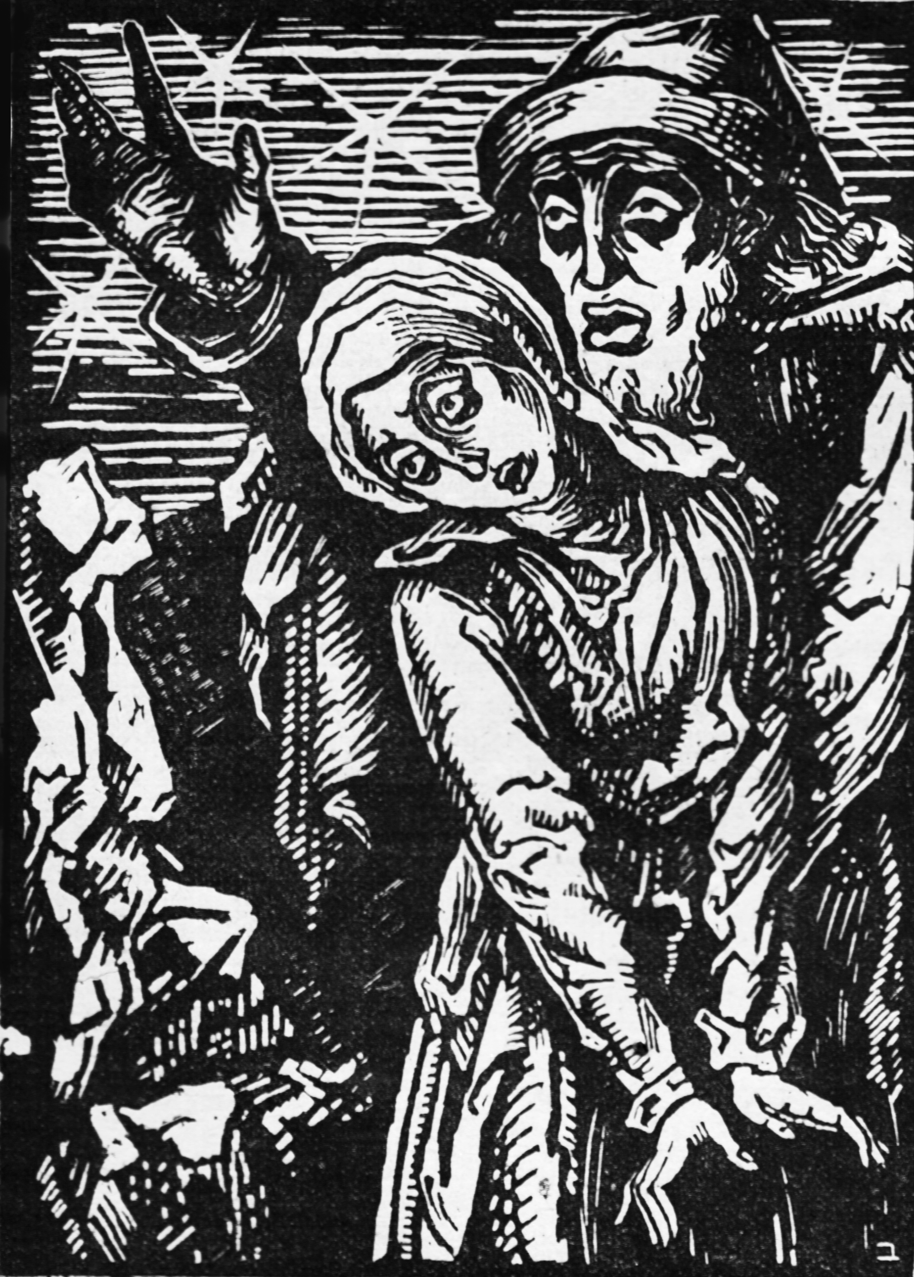 Print